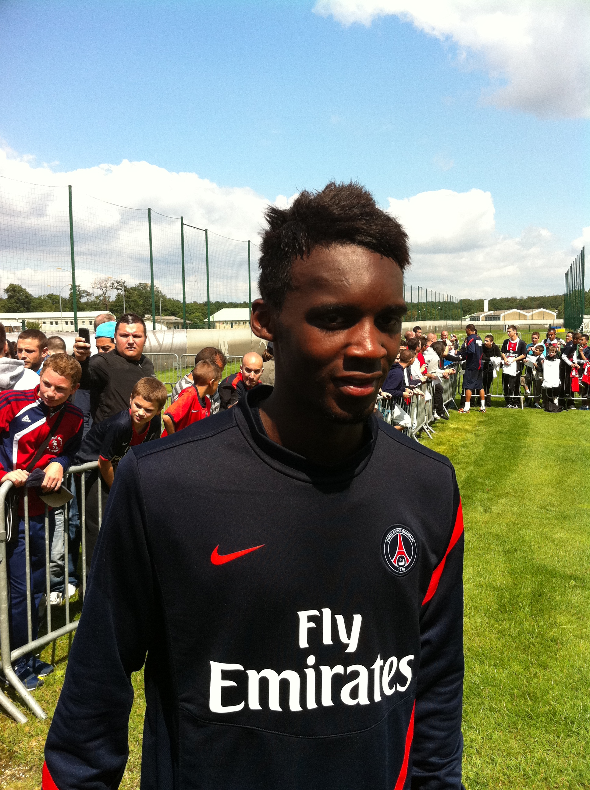 Jean-Christophe Bahebeck au Camp des Loges le 24 juillet 2011. Photo Vincent Hanquet pour